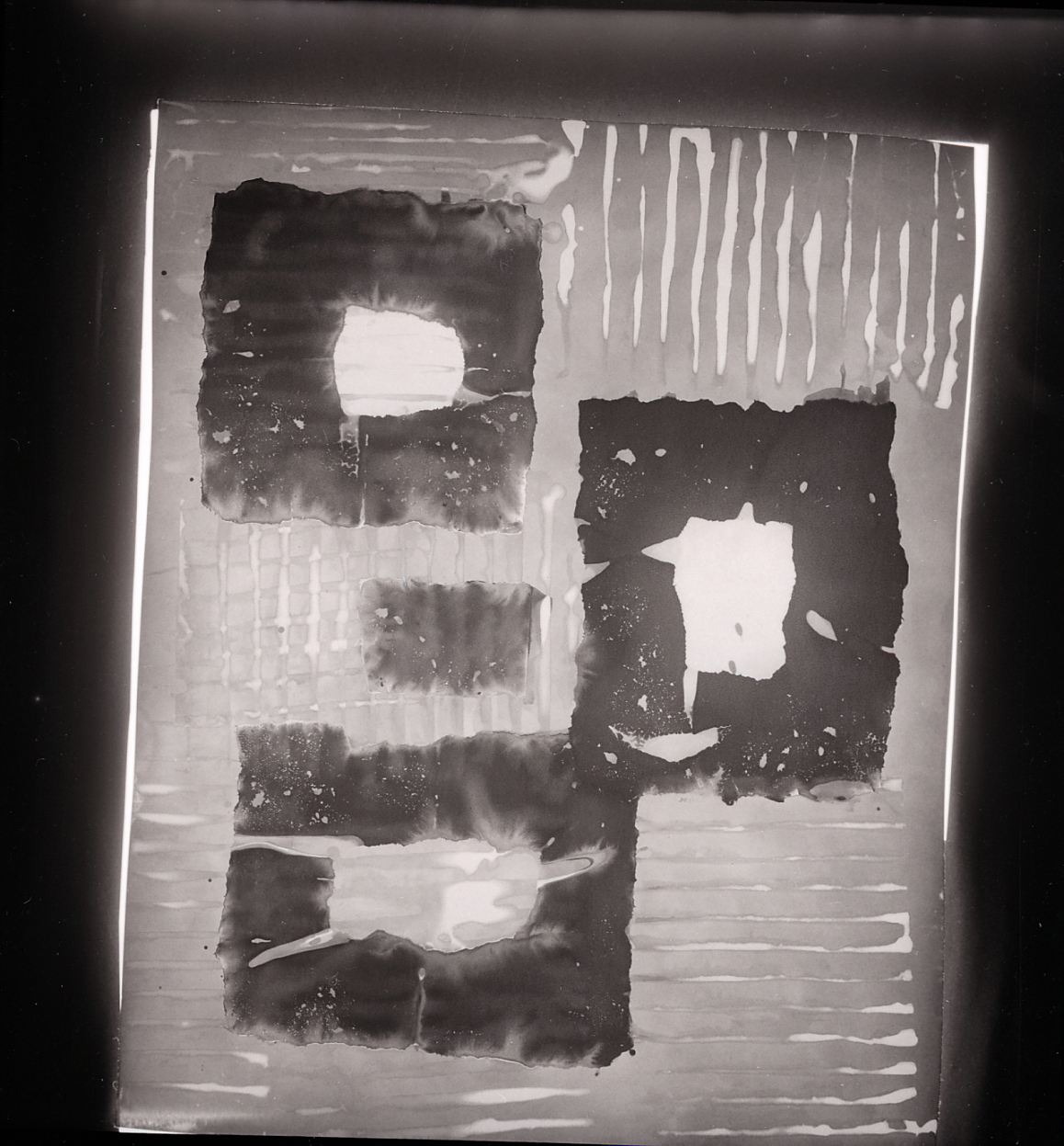 Località non identificata. Studio di Rudi Wach. Interni con grande scultura e studi preparatori appesi alle pareti. Ritrattoambientato dello scultore con la scultura Vienna. Servizio fotografico : Italia, 1966 / Paolo Monti. - Buste: 14, Fototipi: 14 : Negativo b/n, gelatina bromuro d'argento/ pellicola ; 6x6. - ((Serie costituita da 14 buste sciolte di negativi identificati con i nn.: 12729, 12730, 12731, 12732, 12733, 12734, 12735, 12736, 12737, 12738, 12739, 12740, 12741, 12742. - La suddetta serie è contenuta nella scatola G12501-13000, formato 24x30. - Fonte: Agenda di Paolo Monti: Monti/ 3 aprile 1966 - 9 marzo 1971/ 12421-16823 (1966-1971), presso Archivio Paolo Monti